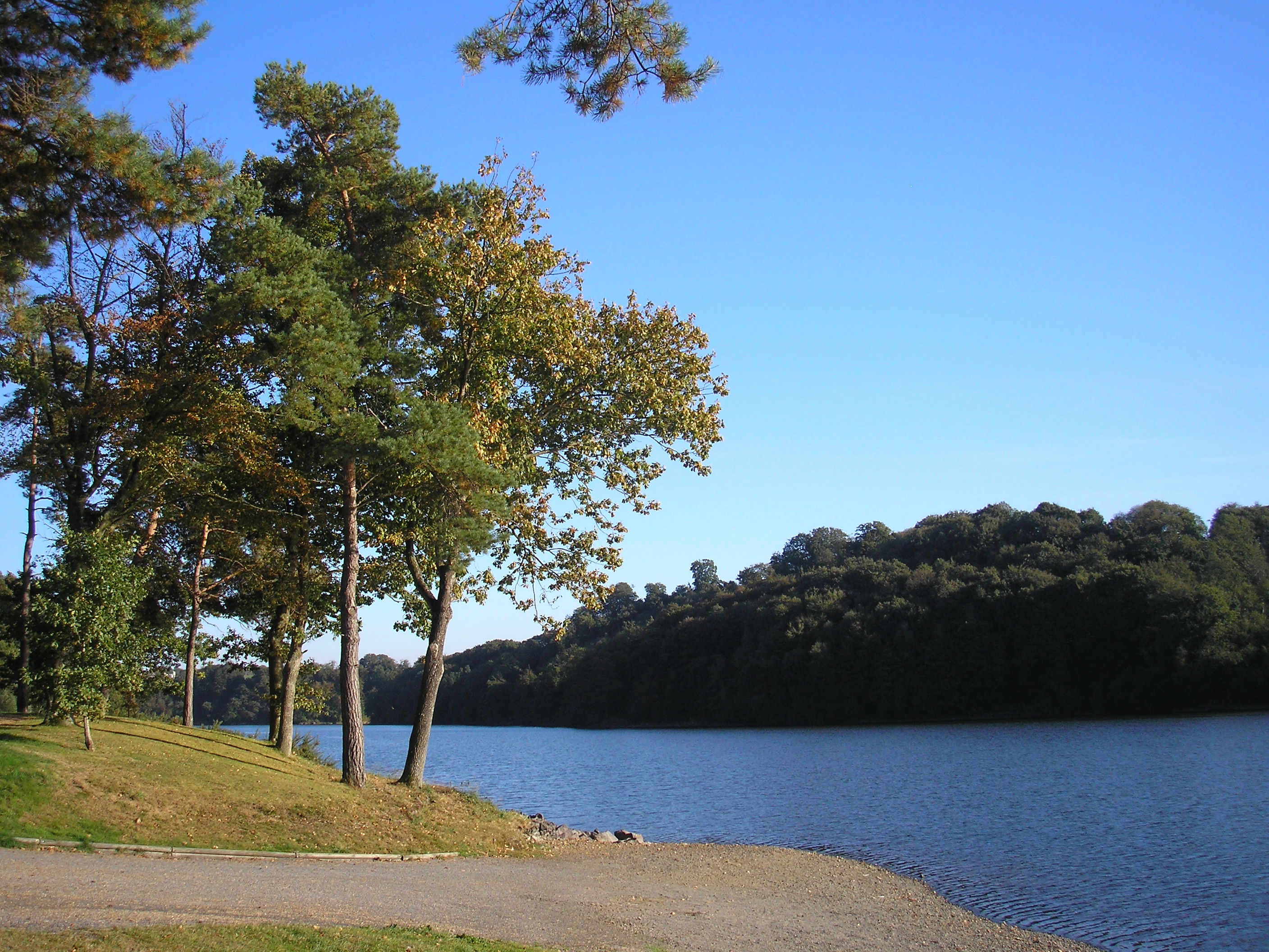 Vezins (Isigny-le-Buat), Saint-Laurent-de-Terregatte (Normandie, France). La retenue d'eau du barrage de Vezins, la rive au premier plan est sur Vezins, la rive opposée sur Saint-Laurent-de-Terregatte.